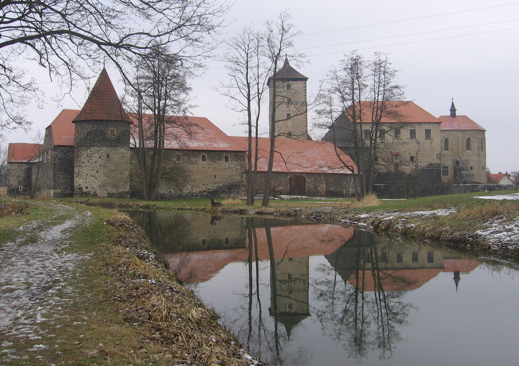 Hrad Švihov v únoru 2014, Švihov.